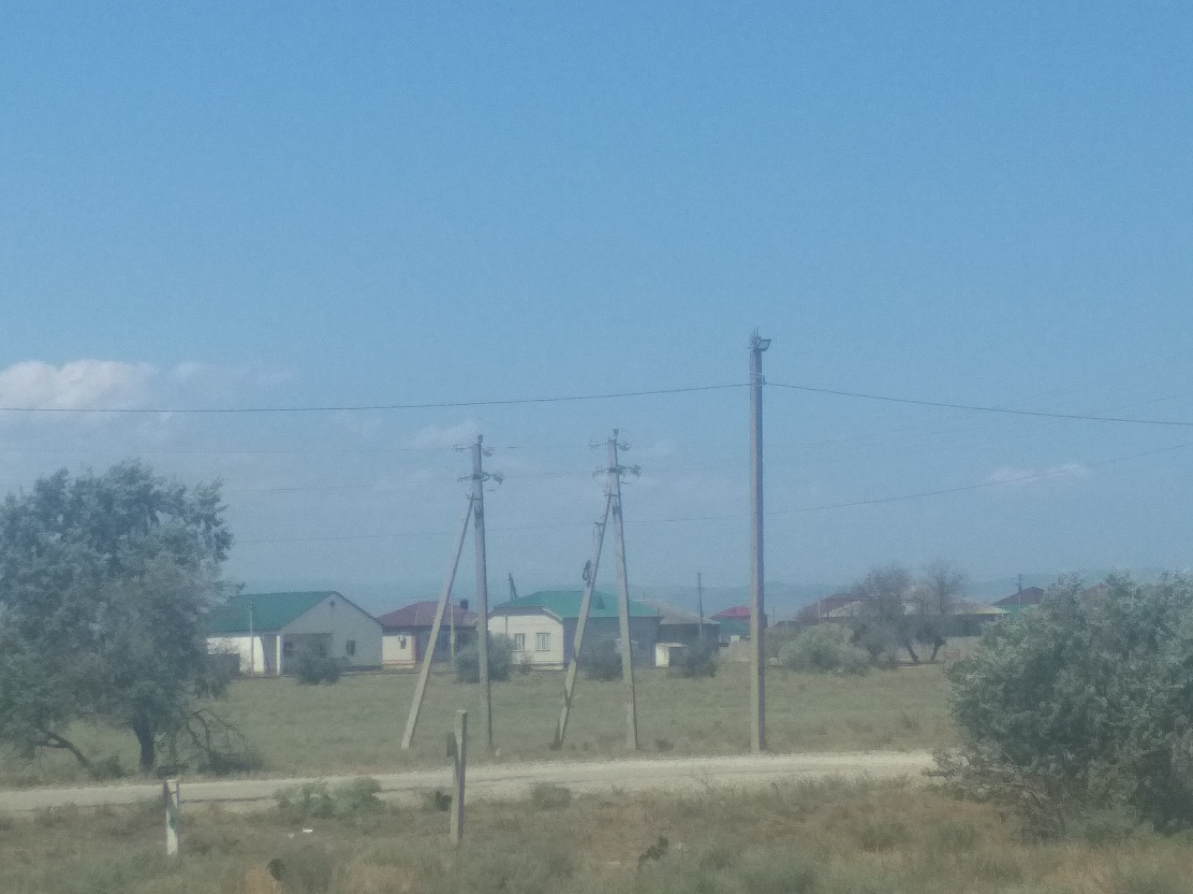 Нохчийн: Дилчун шоссен т1иера сурт